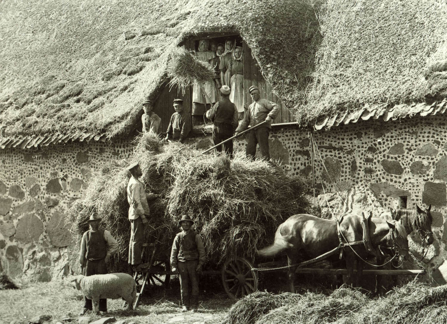 depicted place: Skåne, Rönnebergs hd, Sankt Ibb, Ven, Uranienborg (Sverige (SE))